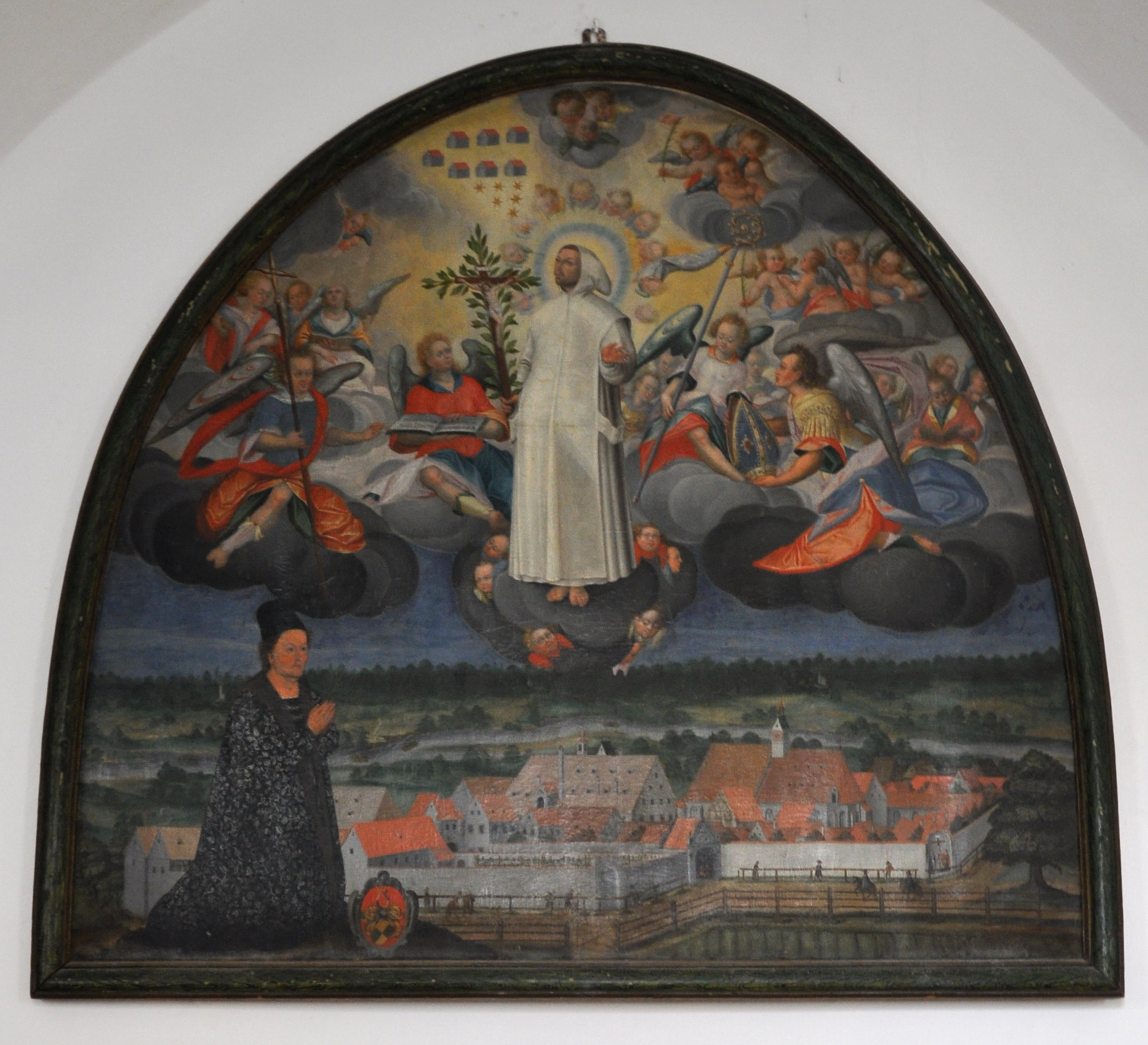 Verklärung des hl. Bruno über Buxheim; Caspar Sichelbein d. Ä. zugeschrieben; wohl 1603, Öl auf Leinwand vor Holzgrund, 185 x 201 cm; Standort: Gotischer Saal vor dem Refektorium der Kartause Buxheim